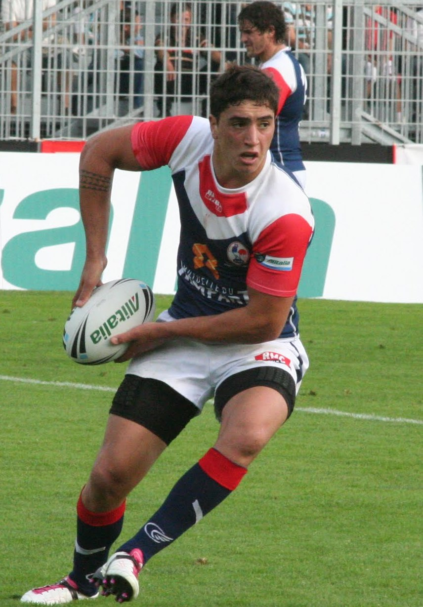 Tony Gigot, joueur français de rugby à XIII.